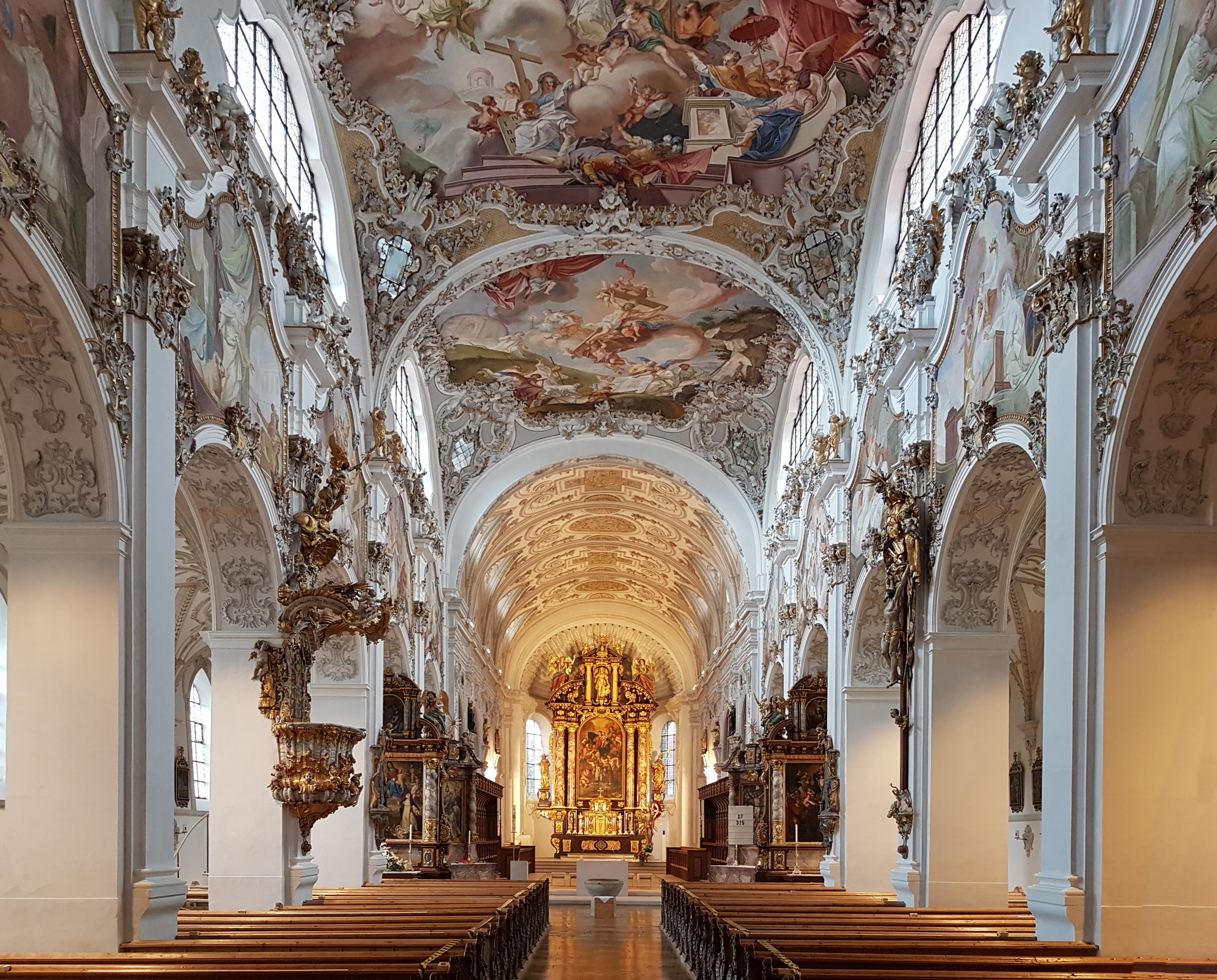 Stiftskirche St. Johannes d. T. (Steingaden)